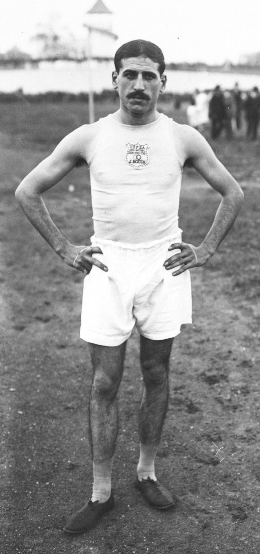 Bouchard et Bouin, course à pied.